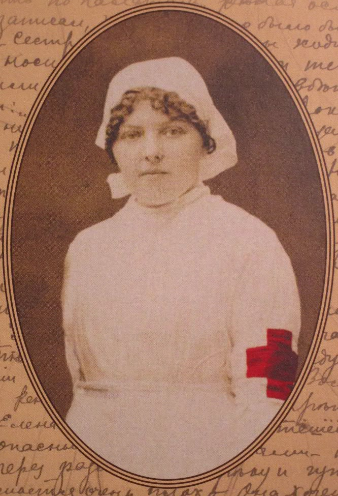 Сетра